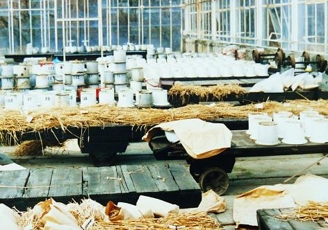 Kolej szklarniowa Akademii Rolniczej Poznań - wazony doświadczalne na wagonach.